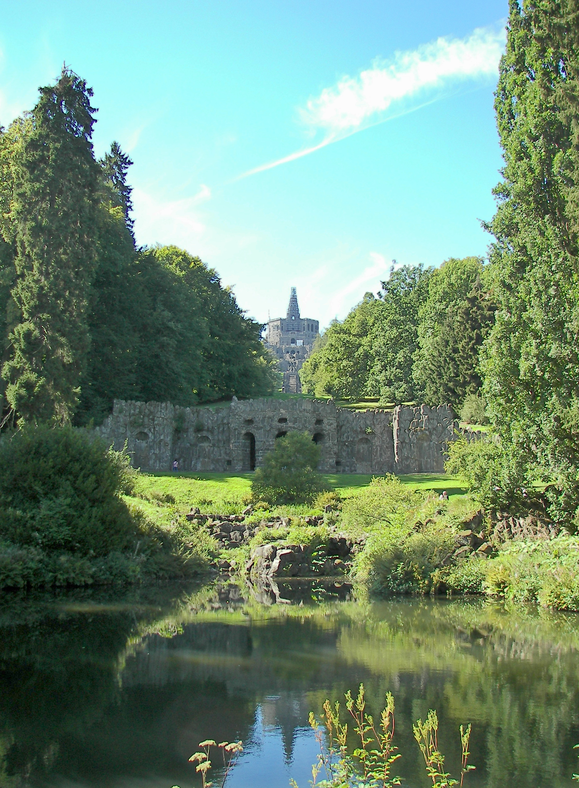 Schlosspark Wilhelmshöhe, Plutogrotte